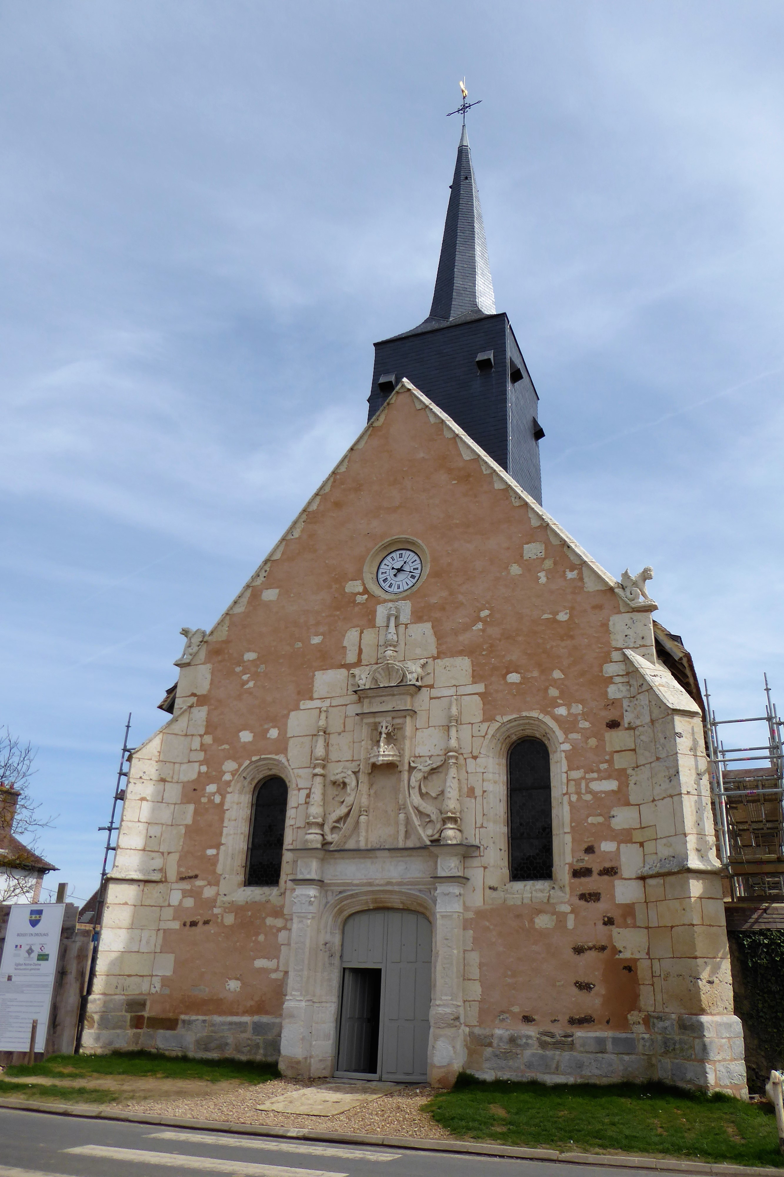 église Notre-Dame, Boissy-en-Drouais, Eure-et-Loir, France.